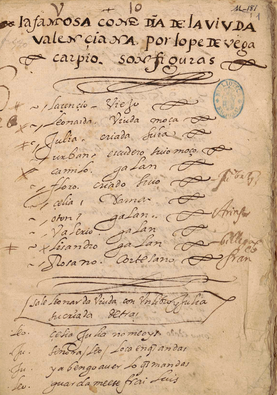 Íncipit (f. 1r.) de una copia manuscrita del siglo XVII de la obra de Lope de Vega, La viuda valenciana. Com.: Celia, Julia, ¿no me oís? (h. 1)... Fin.: la viuda valenciana (h. 58v). Sign. Mss./15032